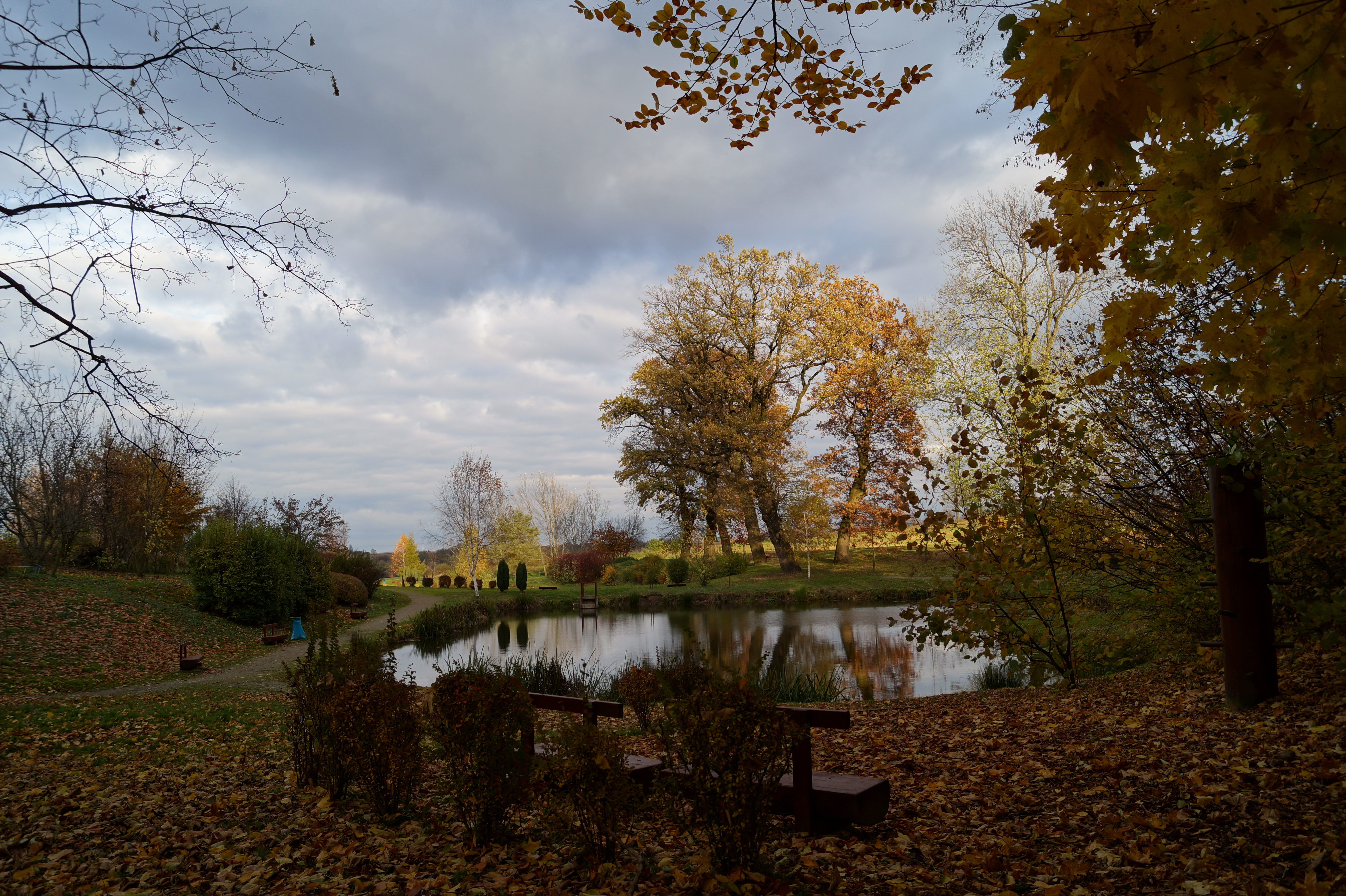 Stawy w Górze Ropczyckiej